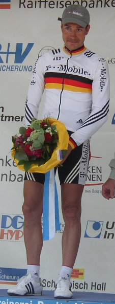 Erik Zabel bei der Siegerehrung nach der zweiten Etappe der Bayern Rundfahrt im Trikot des dt. Meisters.